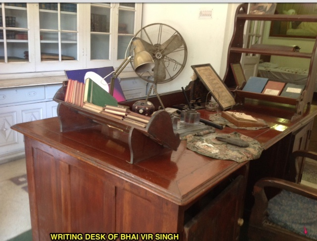 ਪੰਜਾਬੀ: ਭਾਈ ਵੀਰ ਸਿੰਘ ਦਾ ਕੰਮ ਕਰਨ ਦਾ ਮੇਜ਼